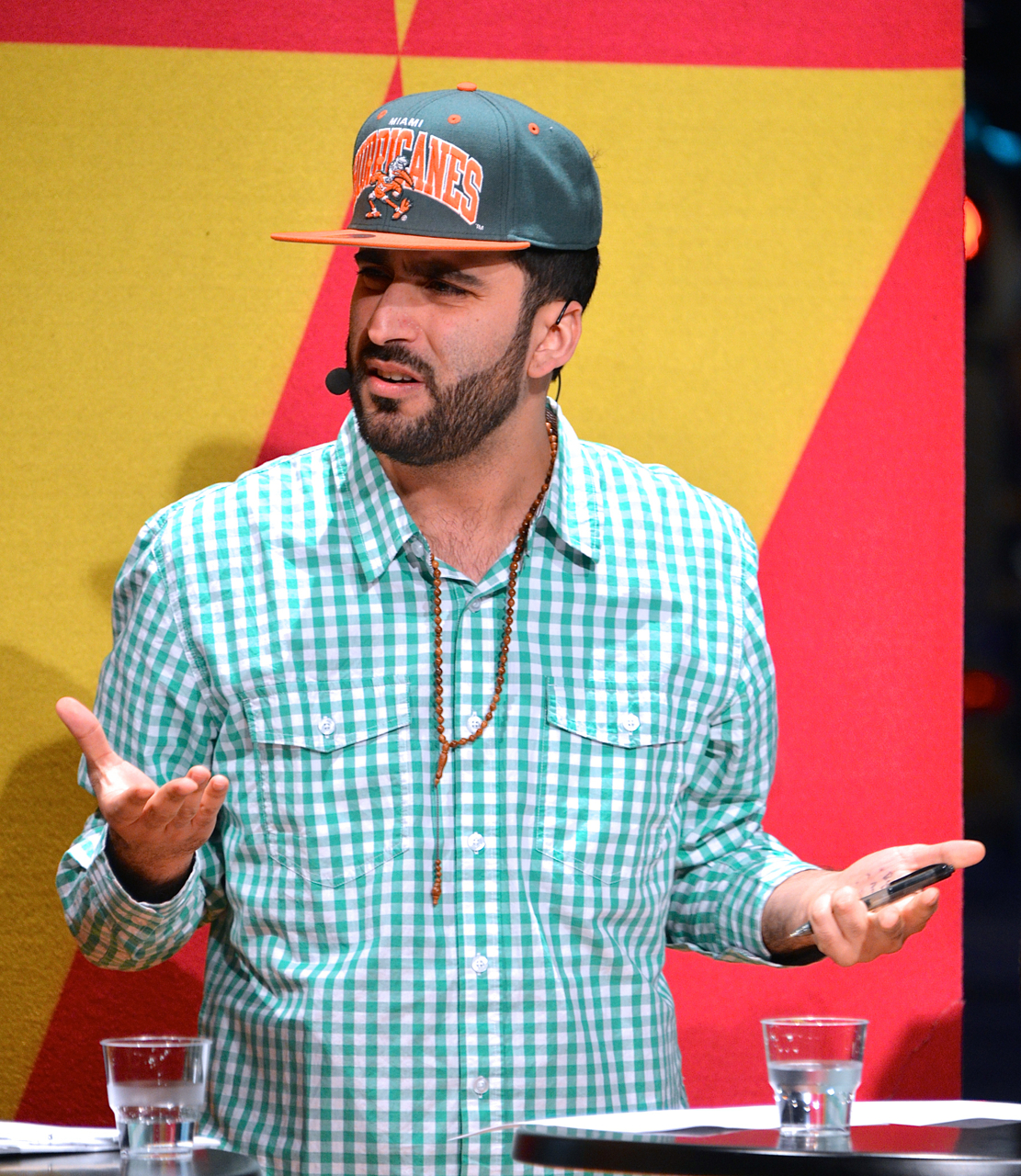 Kulturdebatt på Kulturhuset Stadsteatern den 24 mars 2014. Ska vi kvotera Hamlet? Om representation och innehåll på våra scener. Behrang Miri – Musiker, skribent och skådespelare.